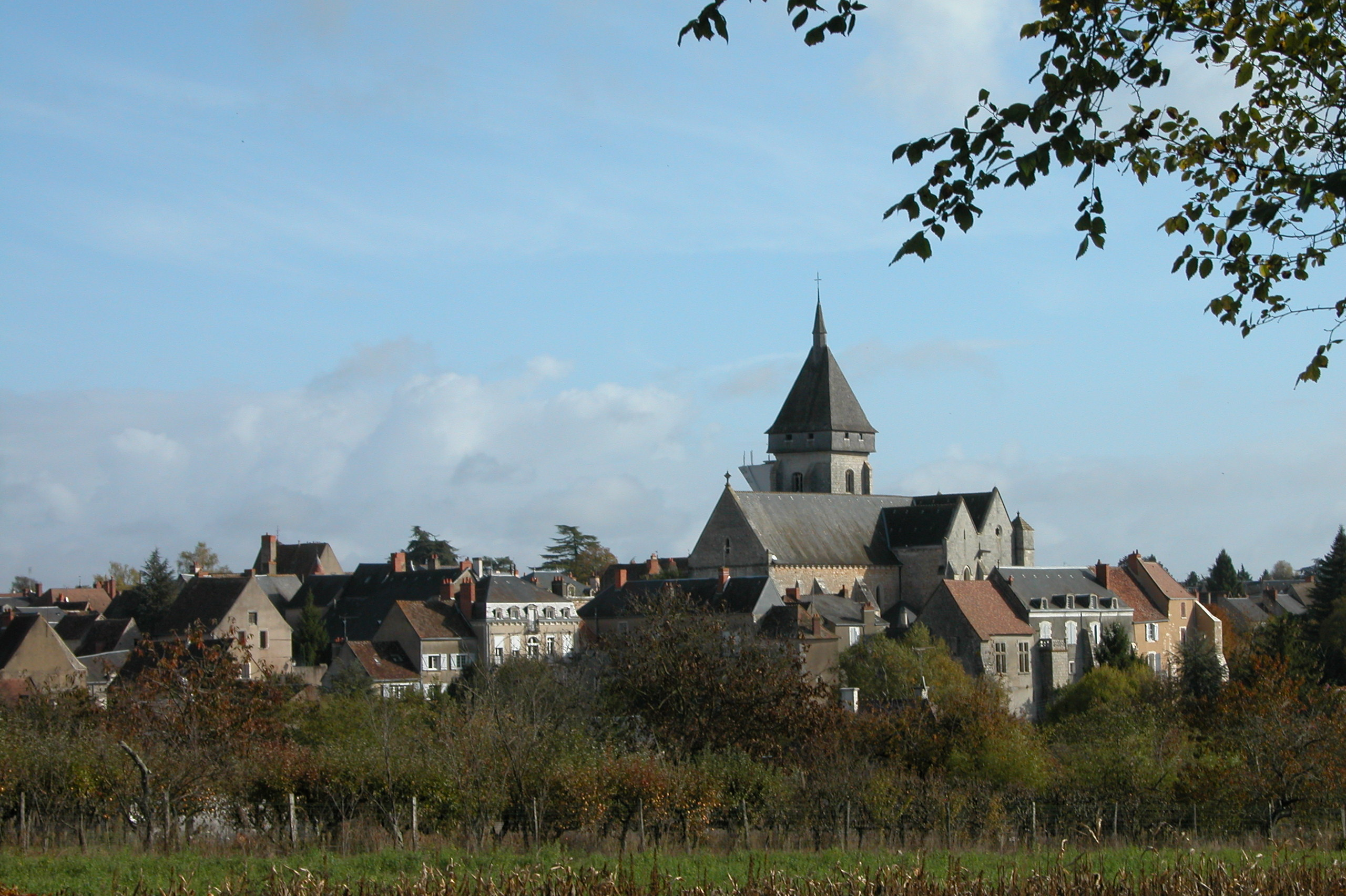 Vue générale de Saint-Marcel (Indre)